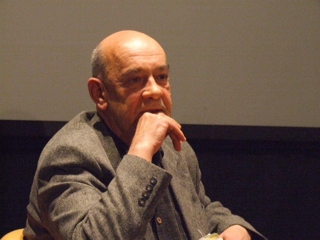 Antoni Krauze (podczas pokazu filmów Bohdana Kosińskiego. Warszawa, Dom Spotkań z Historią, Karowa 20).